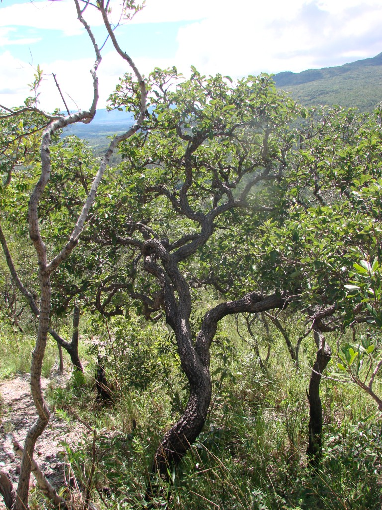 Couepia grandiflora, Chrysobalanaceae - Brasilien/Brasil: Goias, Cavalcante